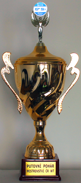 Putovní pohár MČR WT